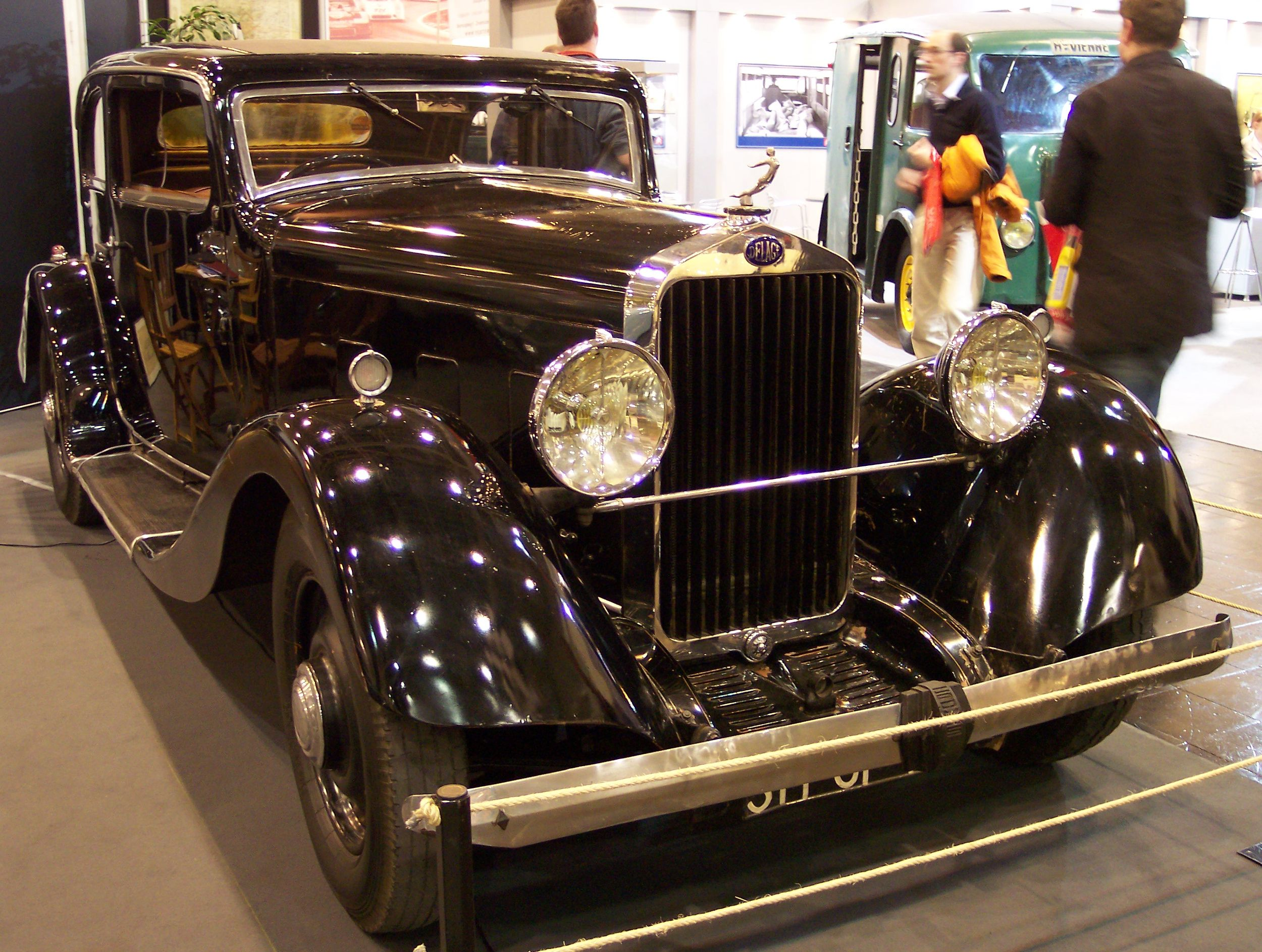 Delage